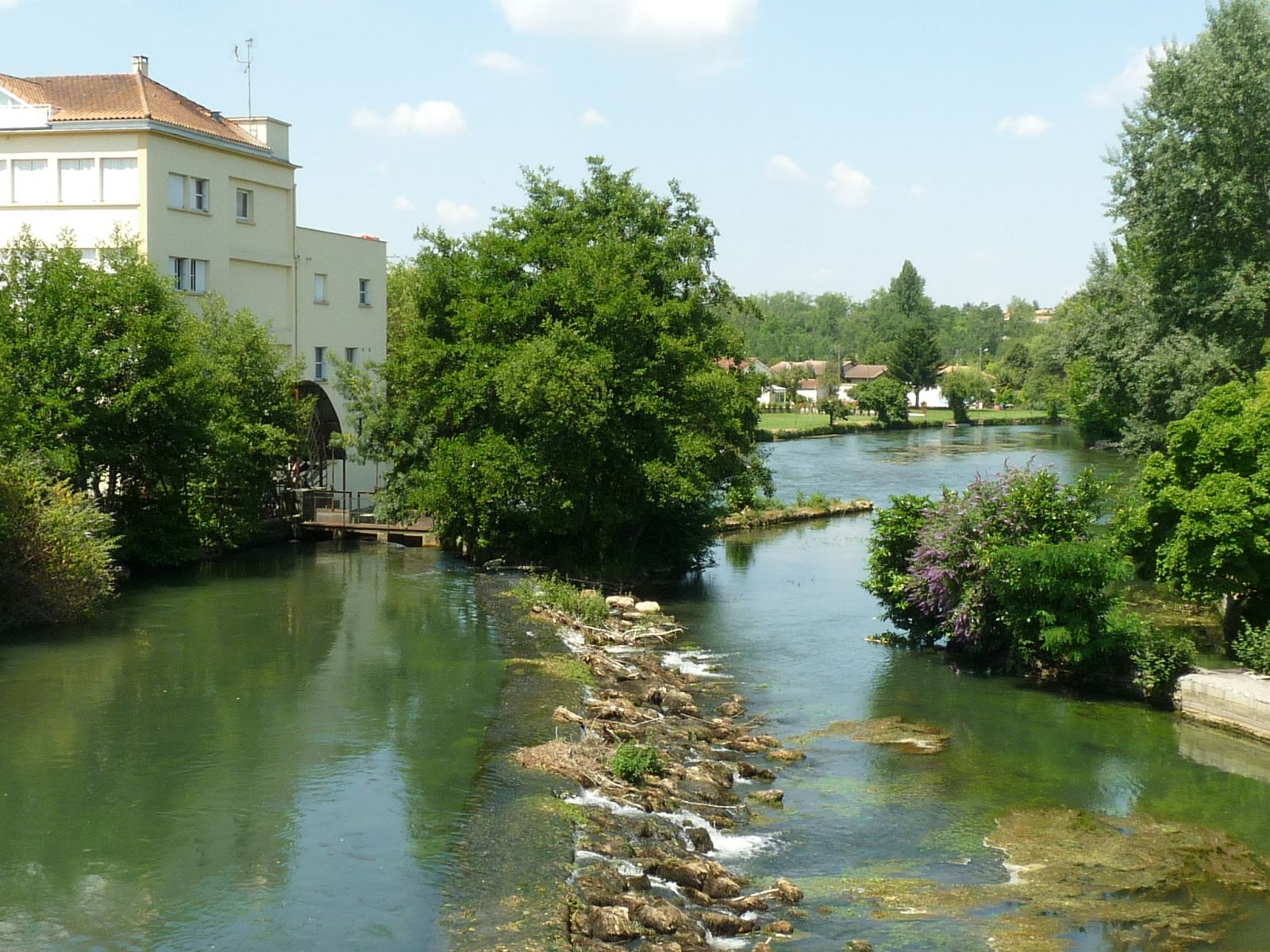 La Touvre au Pontouvre (16), France.